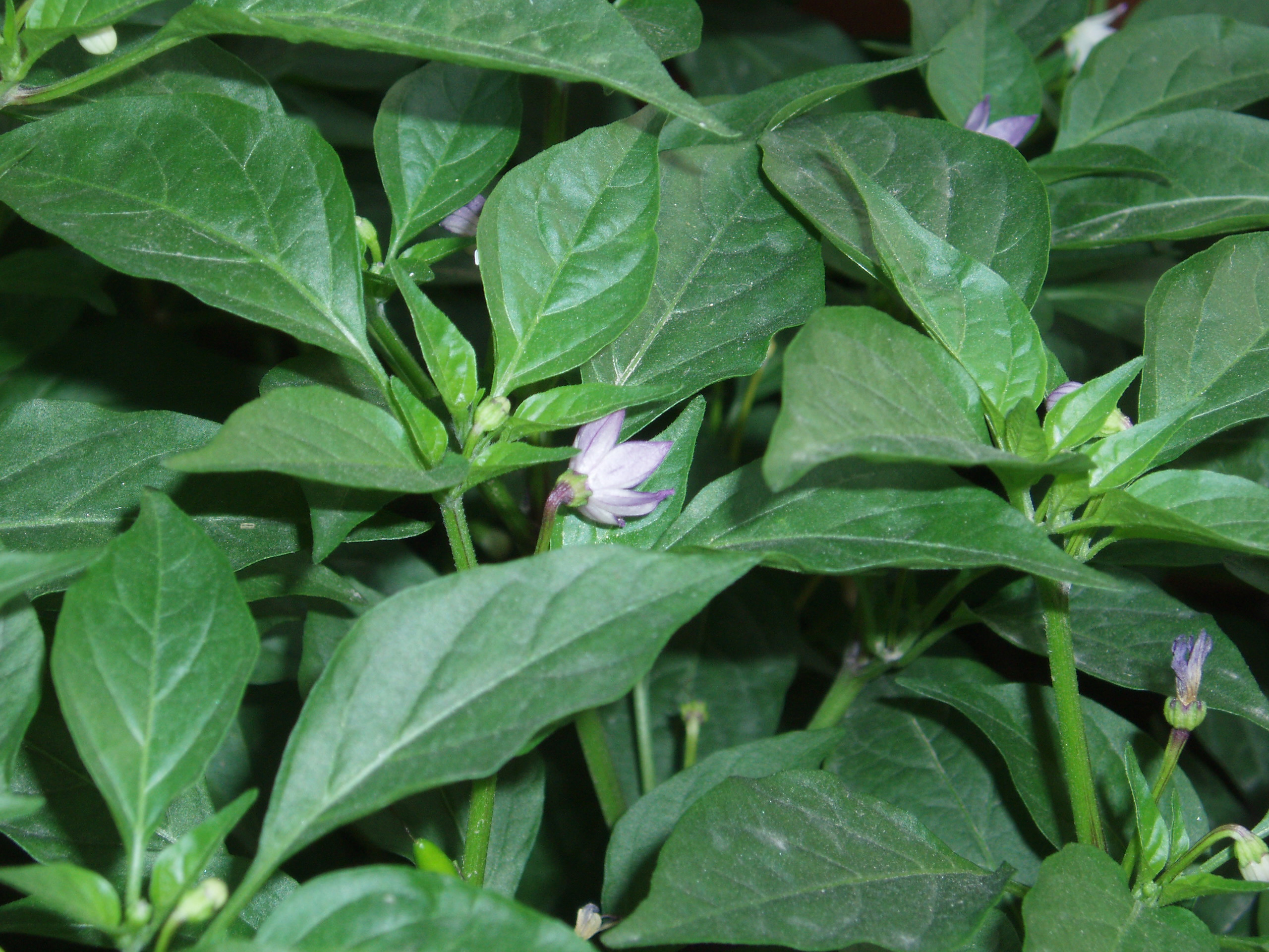 Cone pepper